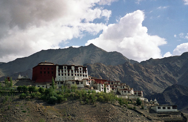 Phyang Gompa, Ladakh, Kashmir